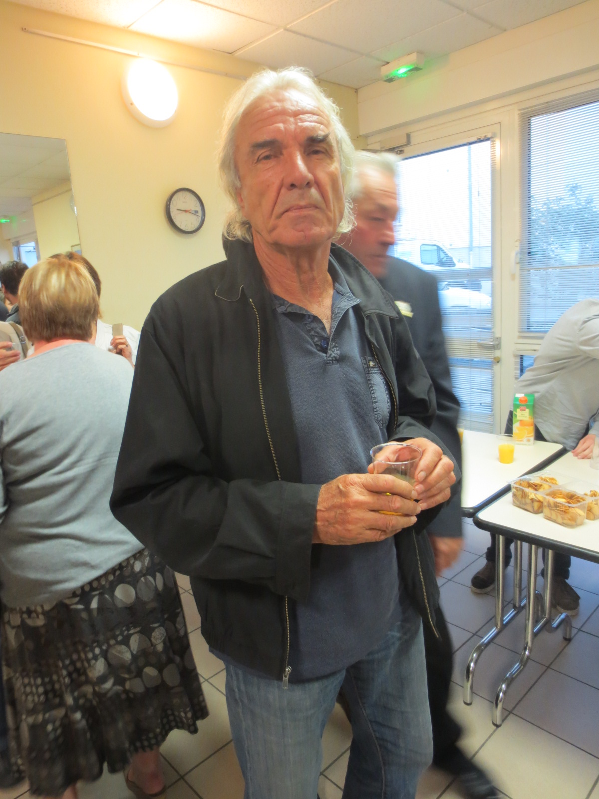 Claude Quittet en 2013 à Besançon